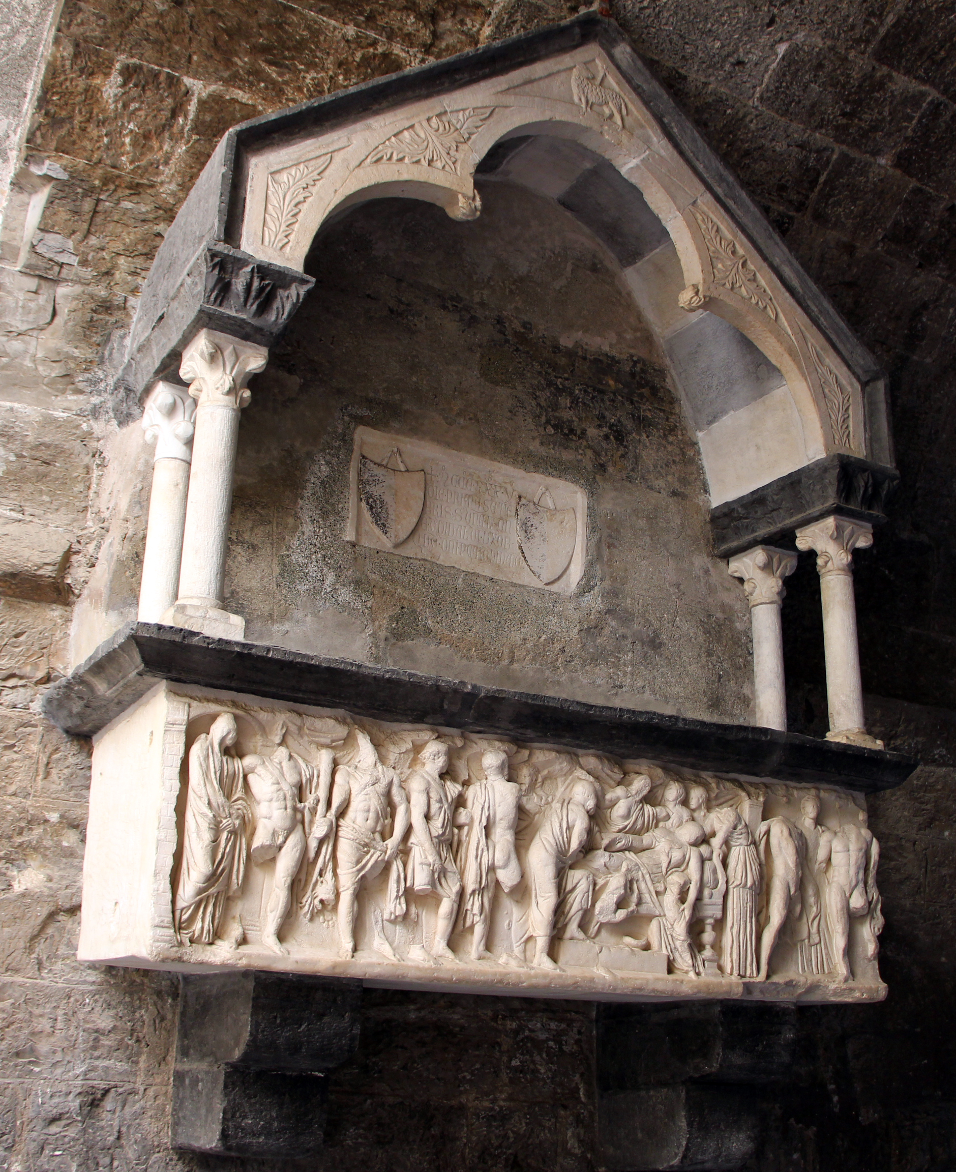 Santa Maria delle Vigne (Genova) The making of this document was supported by Wikimedia CH. (Submit your project!) For all the files concerned, please see the category Supported by Wikimedia CH.